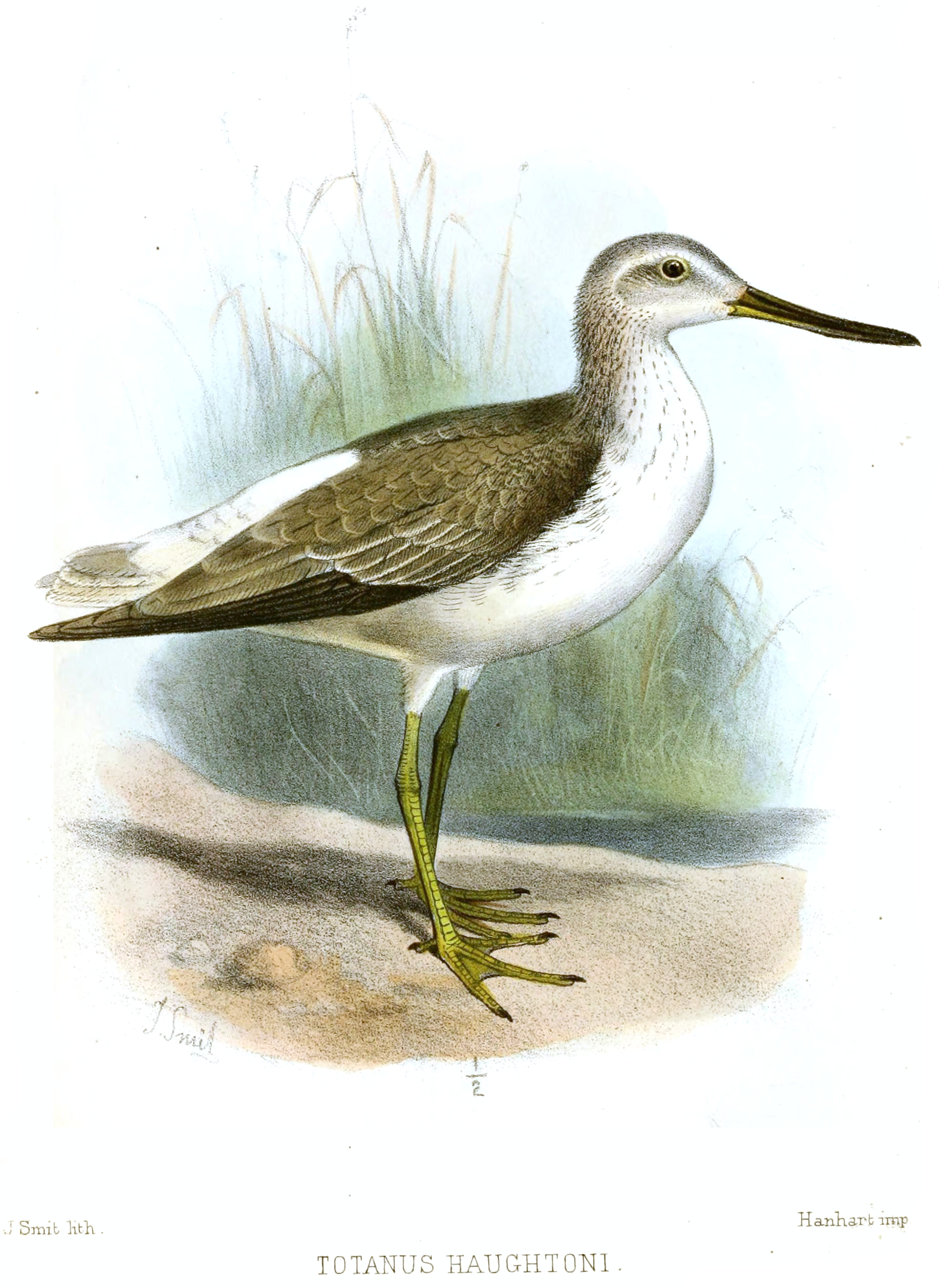 Totanus haughtoni = Tringa guttifer